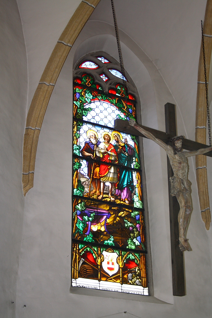 Mittleres Fenster der Apsis der Pfarrkirche von Kritzendorf. Eine Glasmalerei von Carl Geyling aus dem Jahr 1856. Sie stellt drei Märtyrer dar: den Heiligen Vitus, der in siedendem Öl gesotten wird, seinen Erzieher und Begleiter Modestus und seine Amme Crescentia, darunter das Stiftswappen und Weinbaugeräte.